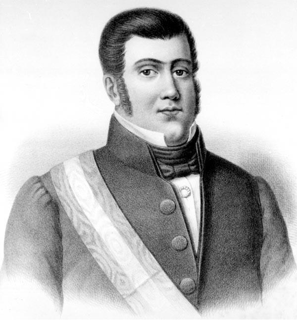 José Tomás Ovalle (Santiago; 21 de diciembre de 1787 - Santiago; 21 de marzo de 1831) fue un abogado y político chileno que gobernó el país en dos oportunidades de manera provisoria, su gobierno consolidó de una forma pacífica el régimen civil.